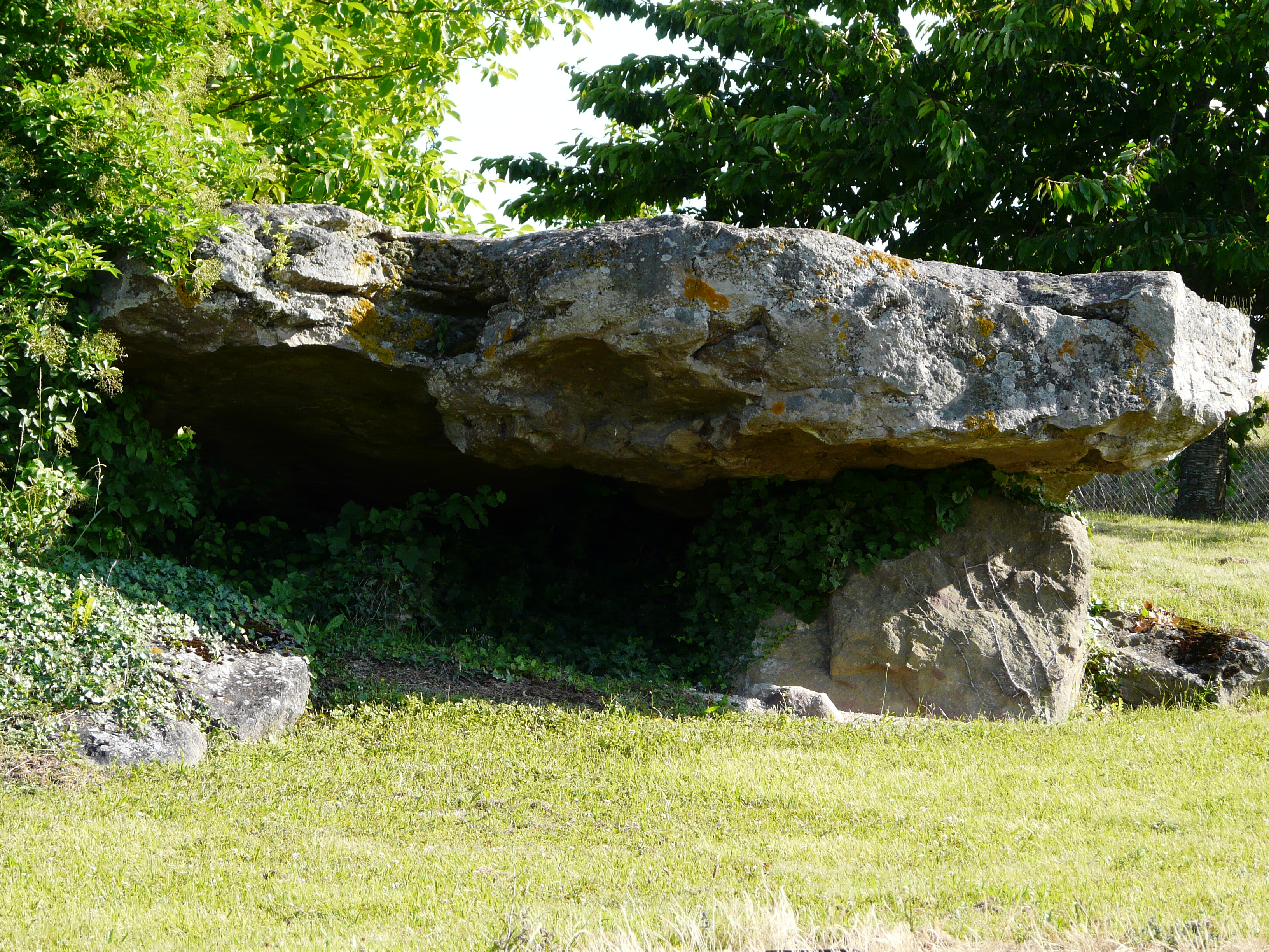 Dolmen de la Fontaine de Son n°2, Saint-Léger-de-Montbrillais, Vienne, France